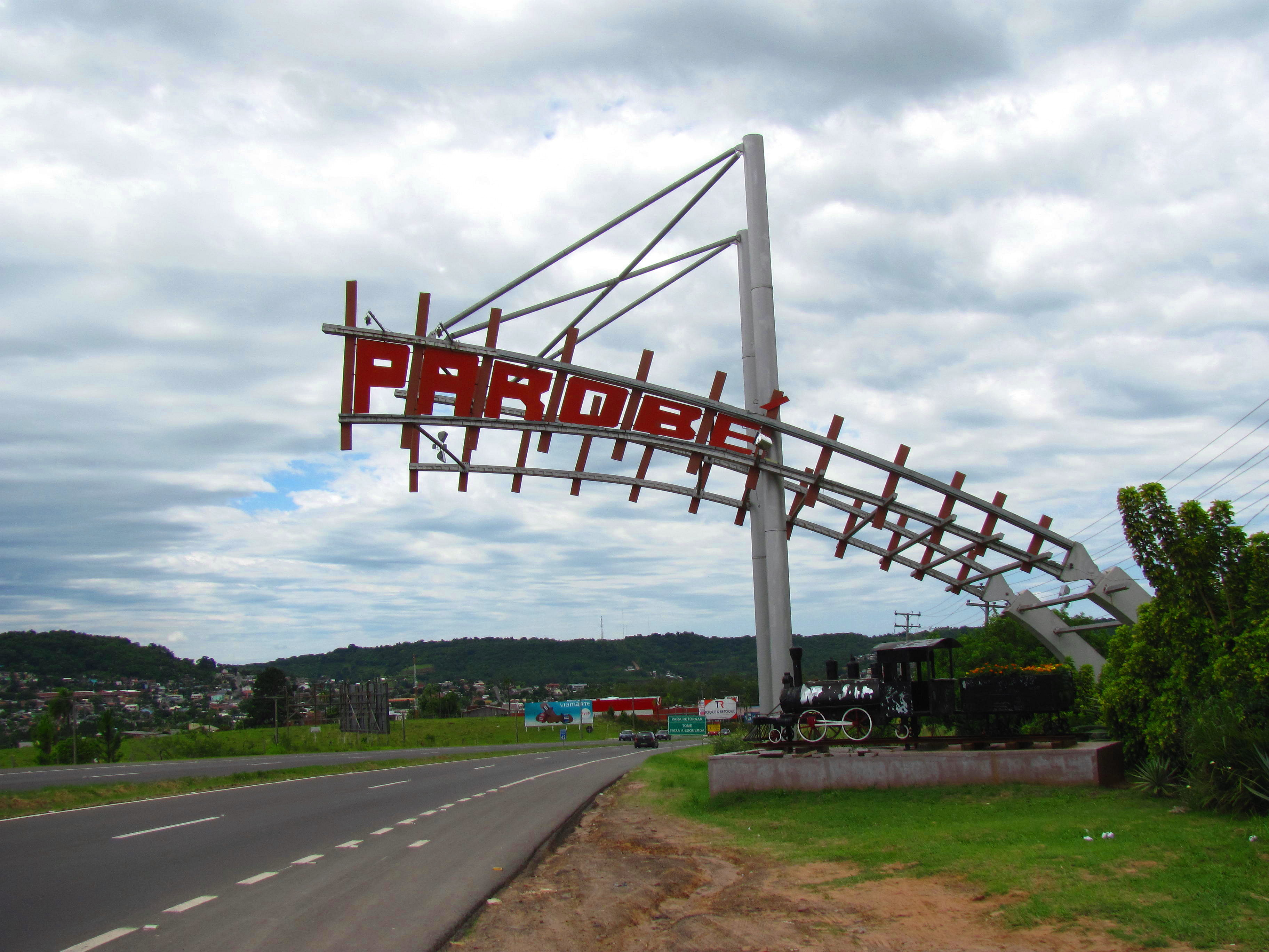 Portal de Parobé